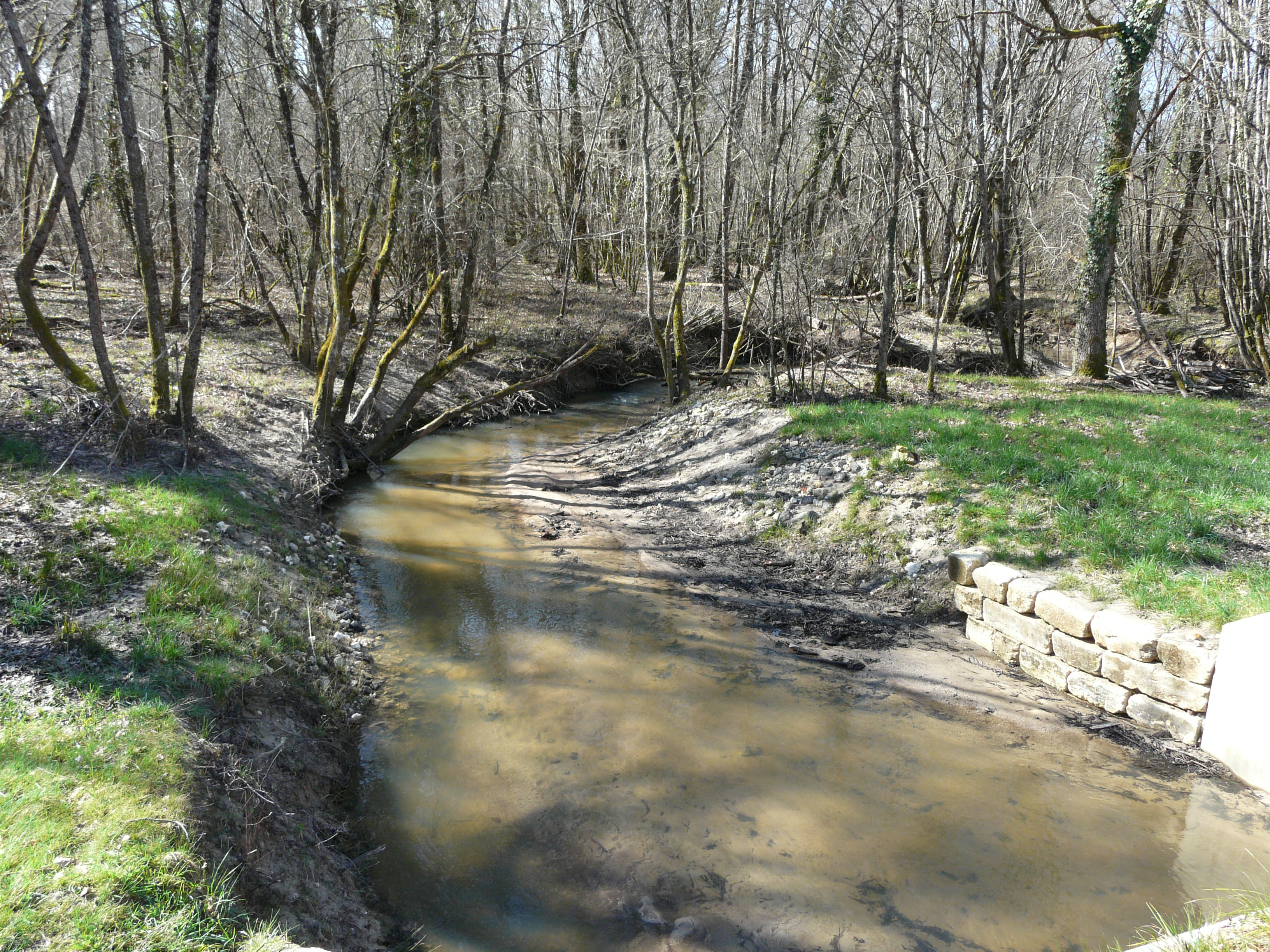 Le Grolet marque la limite entre les communes de Saint-Étienne-de-Puycorbier (à gauche) et Saint-Michel-de-Double (à droite), Dordogne, France. Vue prise au pont de la route départementale 38 en direction de l'aval.